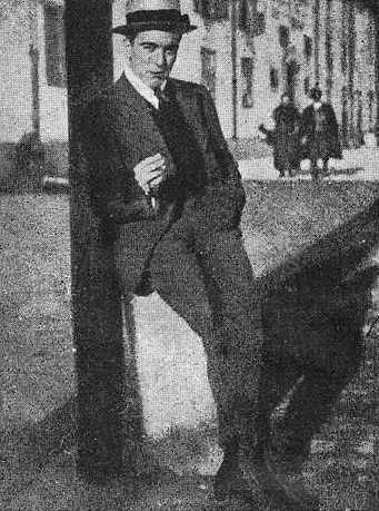 Leandro Pita Romero, fotografía en Vida Gallega 1917